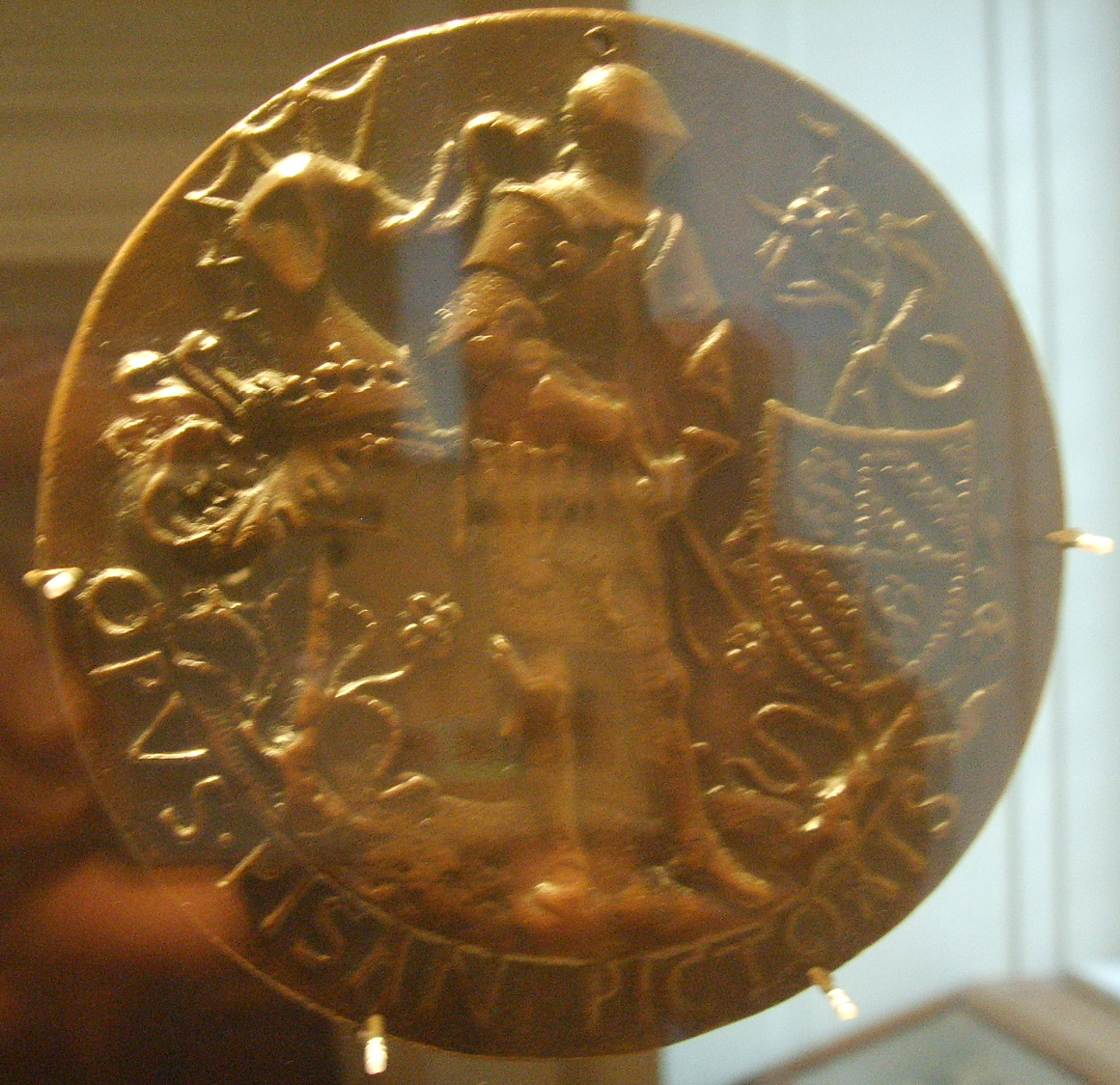 National gallery in washington d.c., pisanello, medaglia di pandolfo malatesta verso